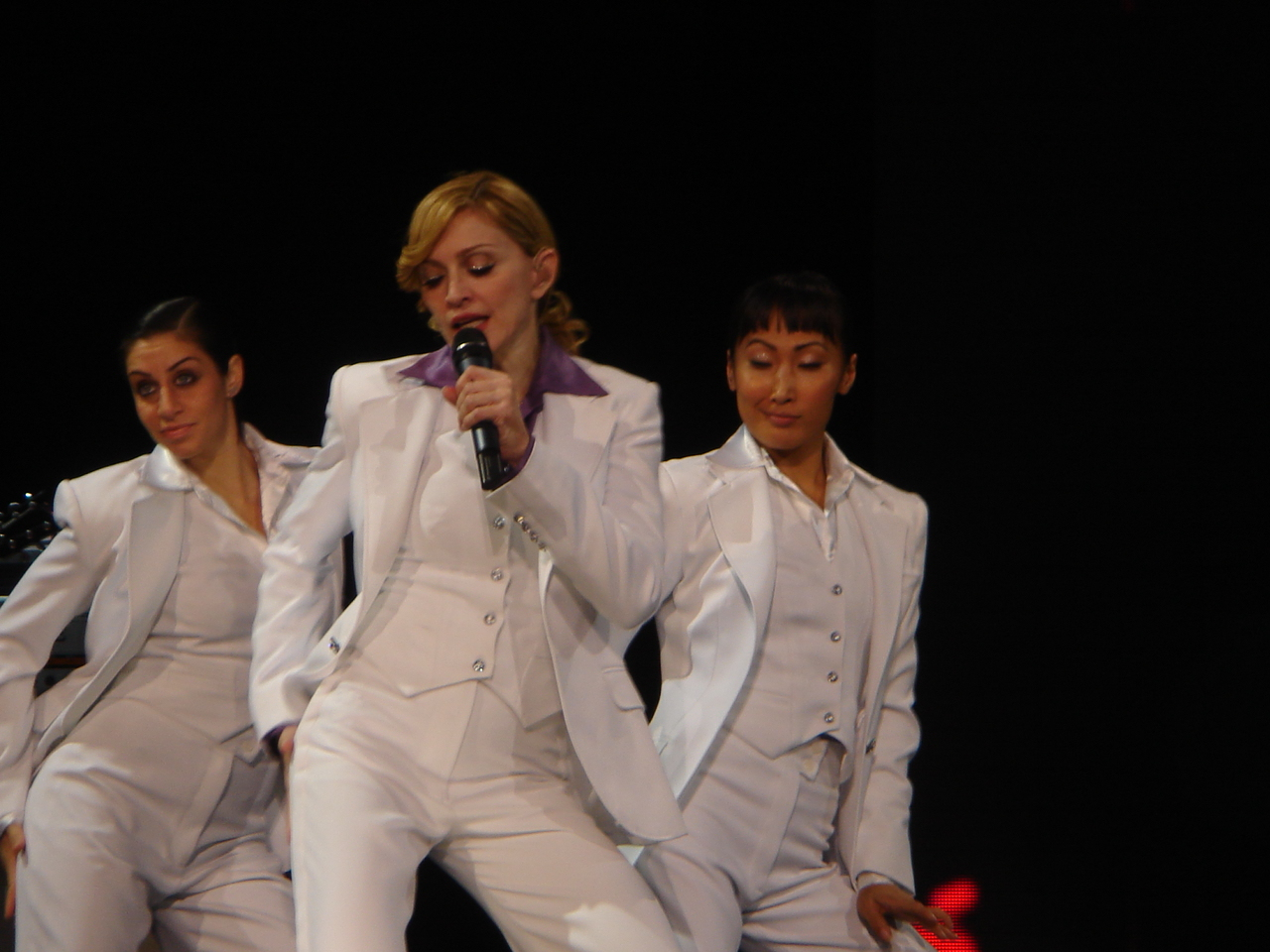 Madonna